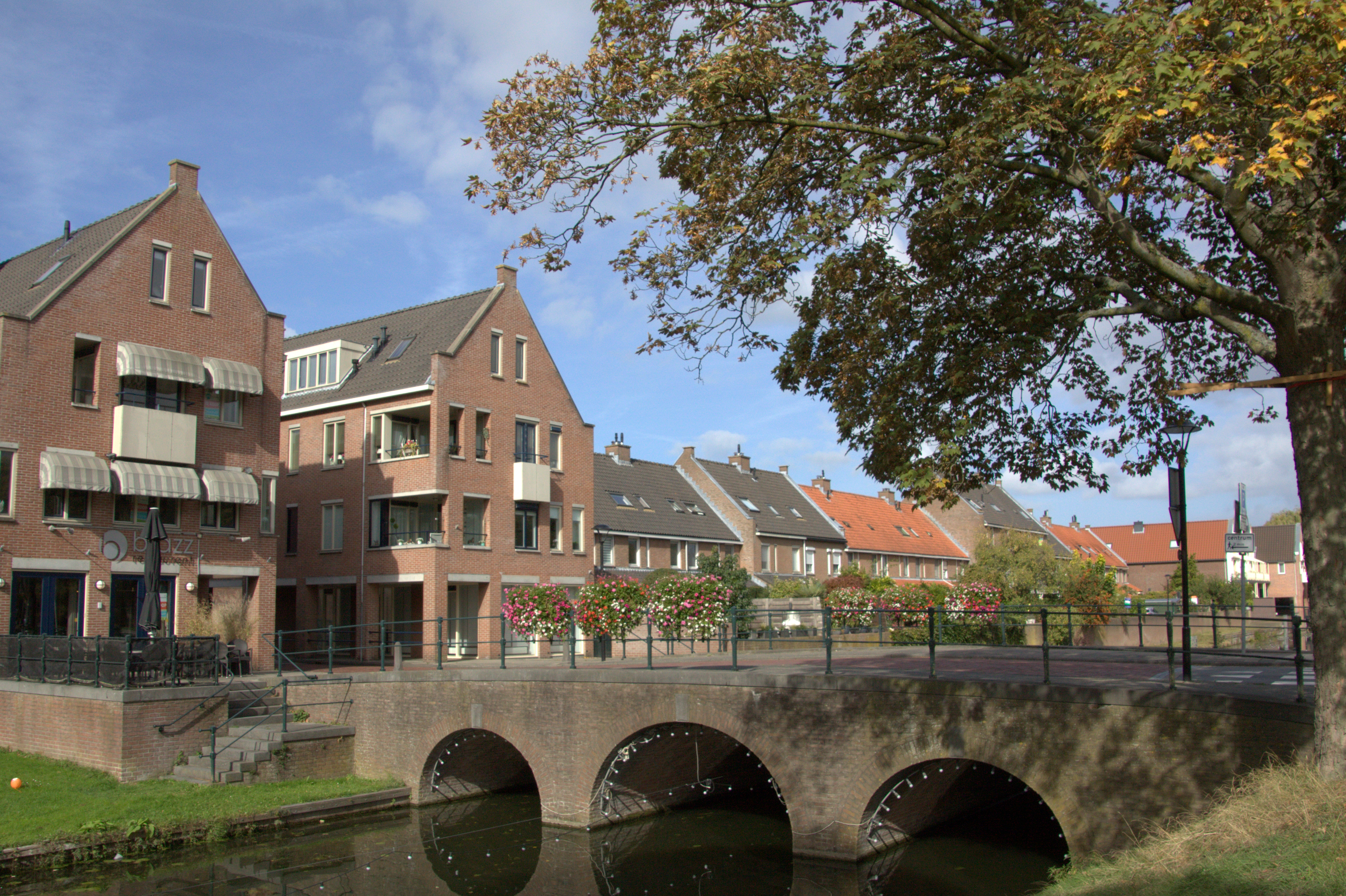 Linksaf over de mooie boogbrug ga je naar het oude centrum van de stad Vianen.